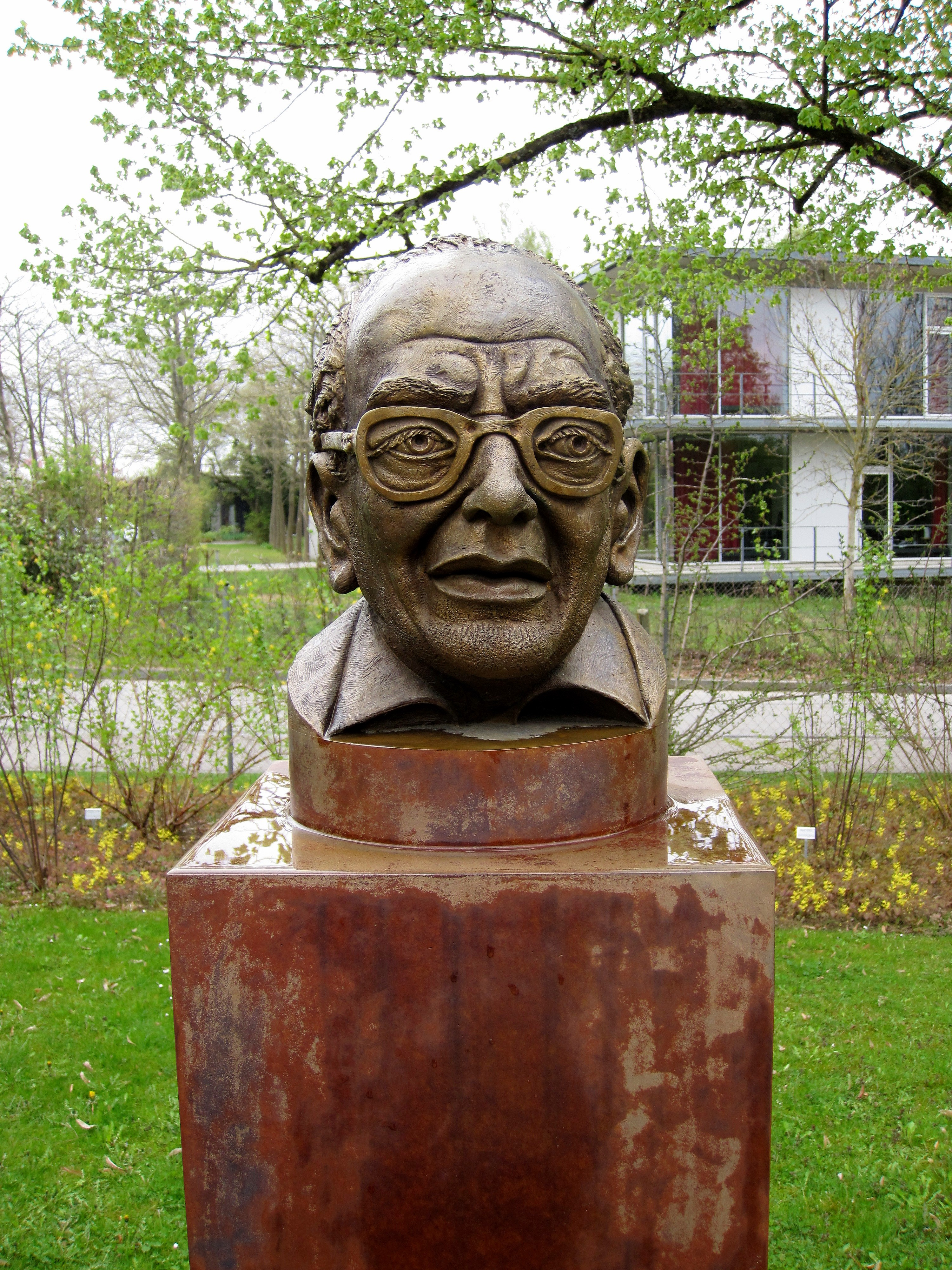 Richard Hansen, Denkmal in den vom ihm begründeten Staudengärten. (Bildhauer: Jürgen Goertz)